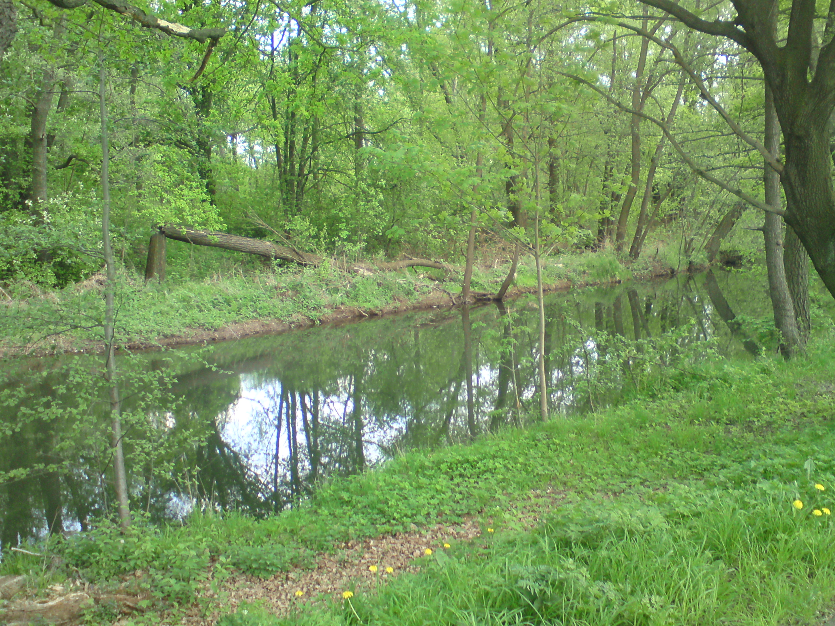 Teil der Spree, der durch den Cottbuser Volkspark fließt